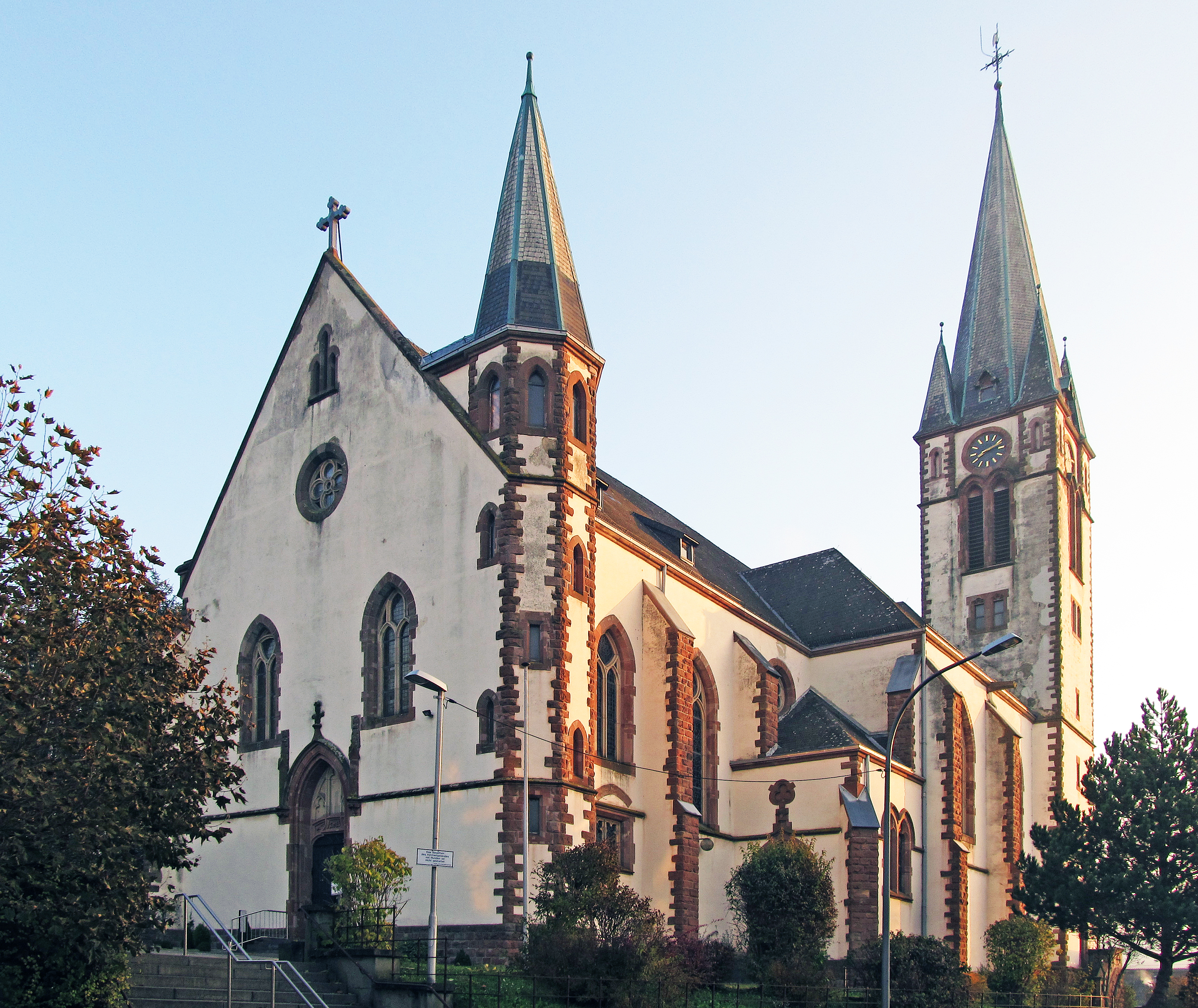 Die katholische Pfarrkirche Mariä Himmelfahrt in Geislautern, einem Stadtteil von Völklingen, Saarland